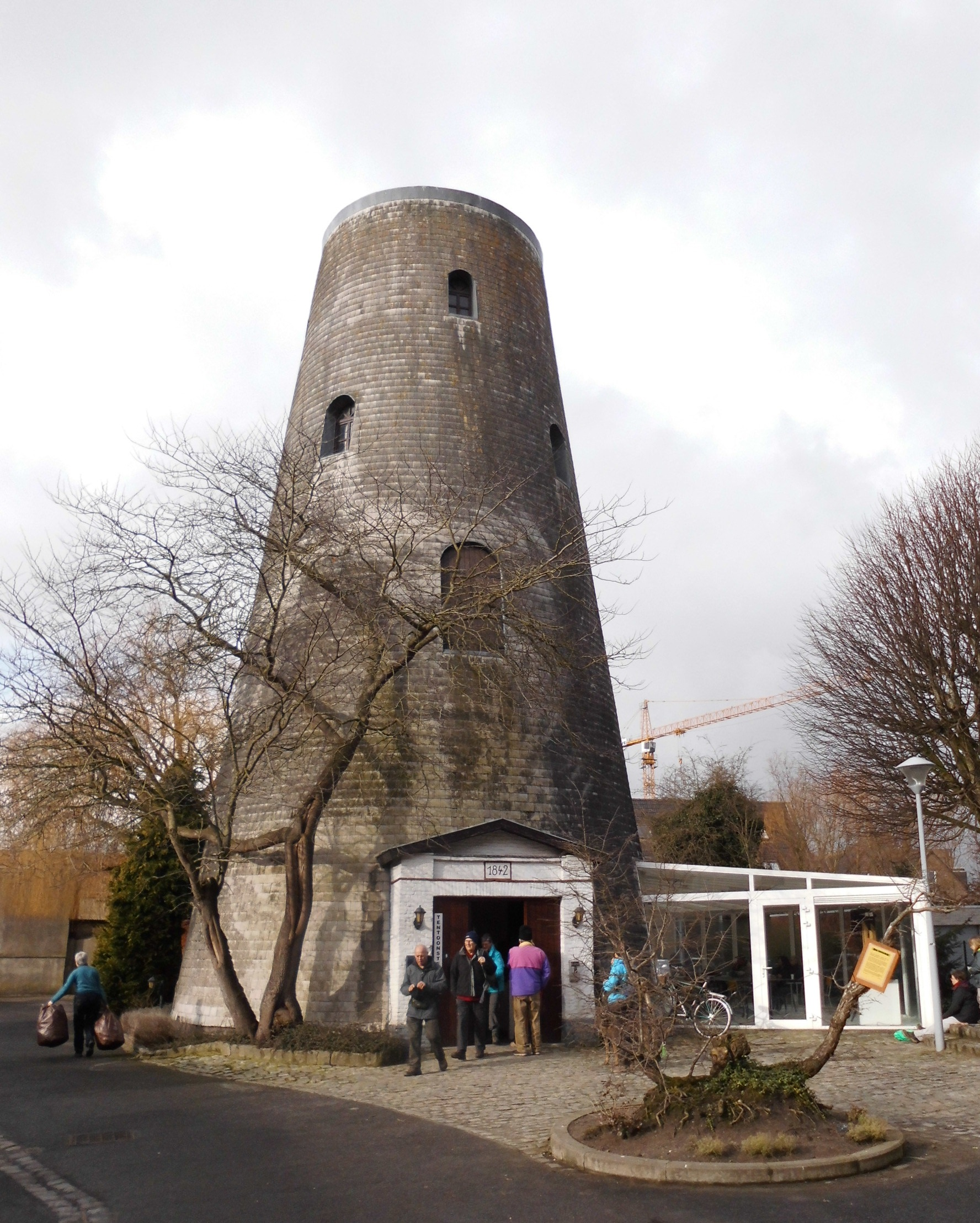 Molenromp van de voormalige stellingmolen Braetsmolen of Oostmolen, thans "De Wieke" - Brugsestraat - Oostkamp - West-Vlaanderen - België